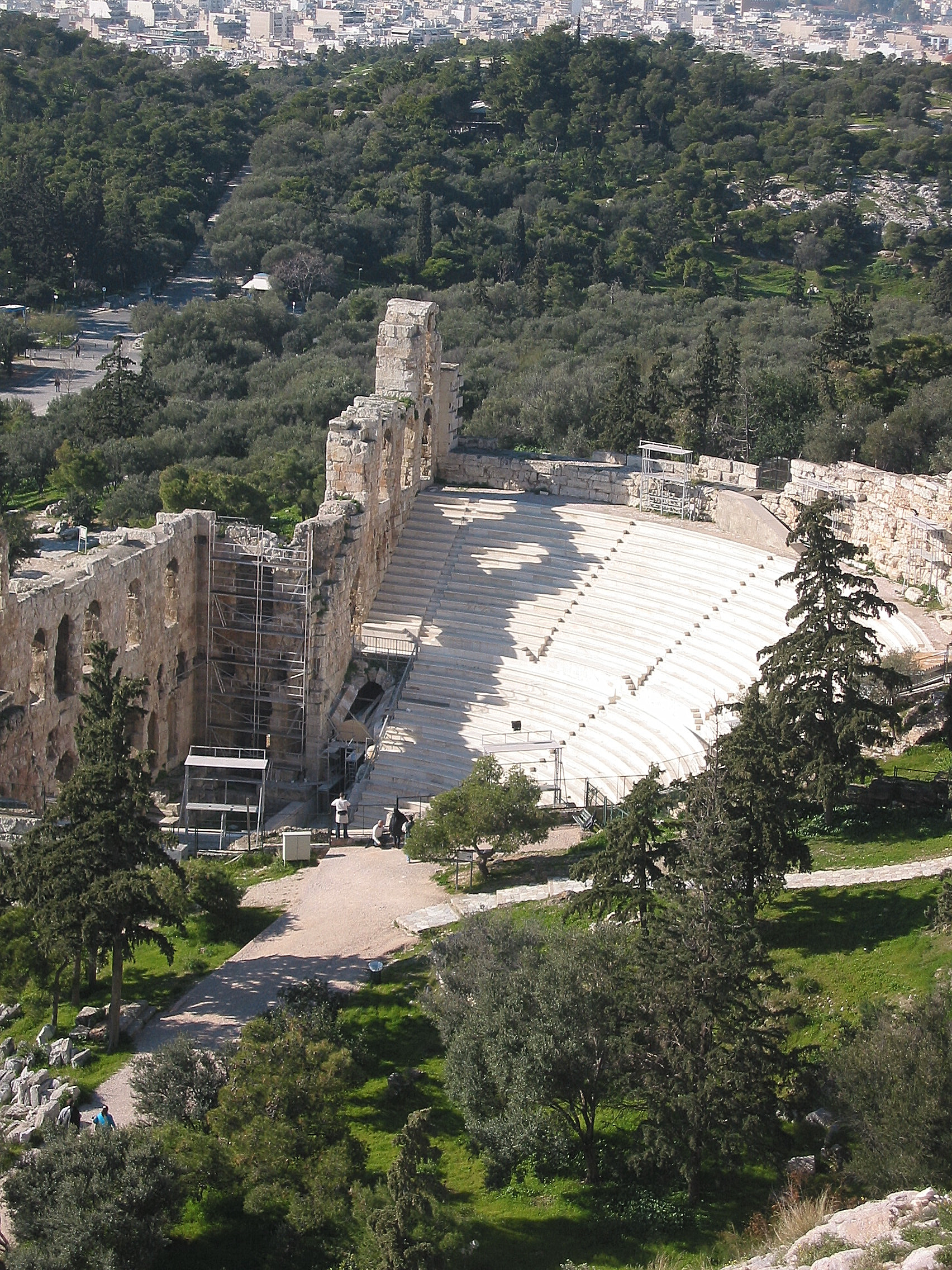 Athènes Hérode Atticus. Photo prise par Harrieta171 le 21/01/06